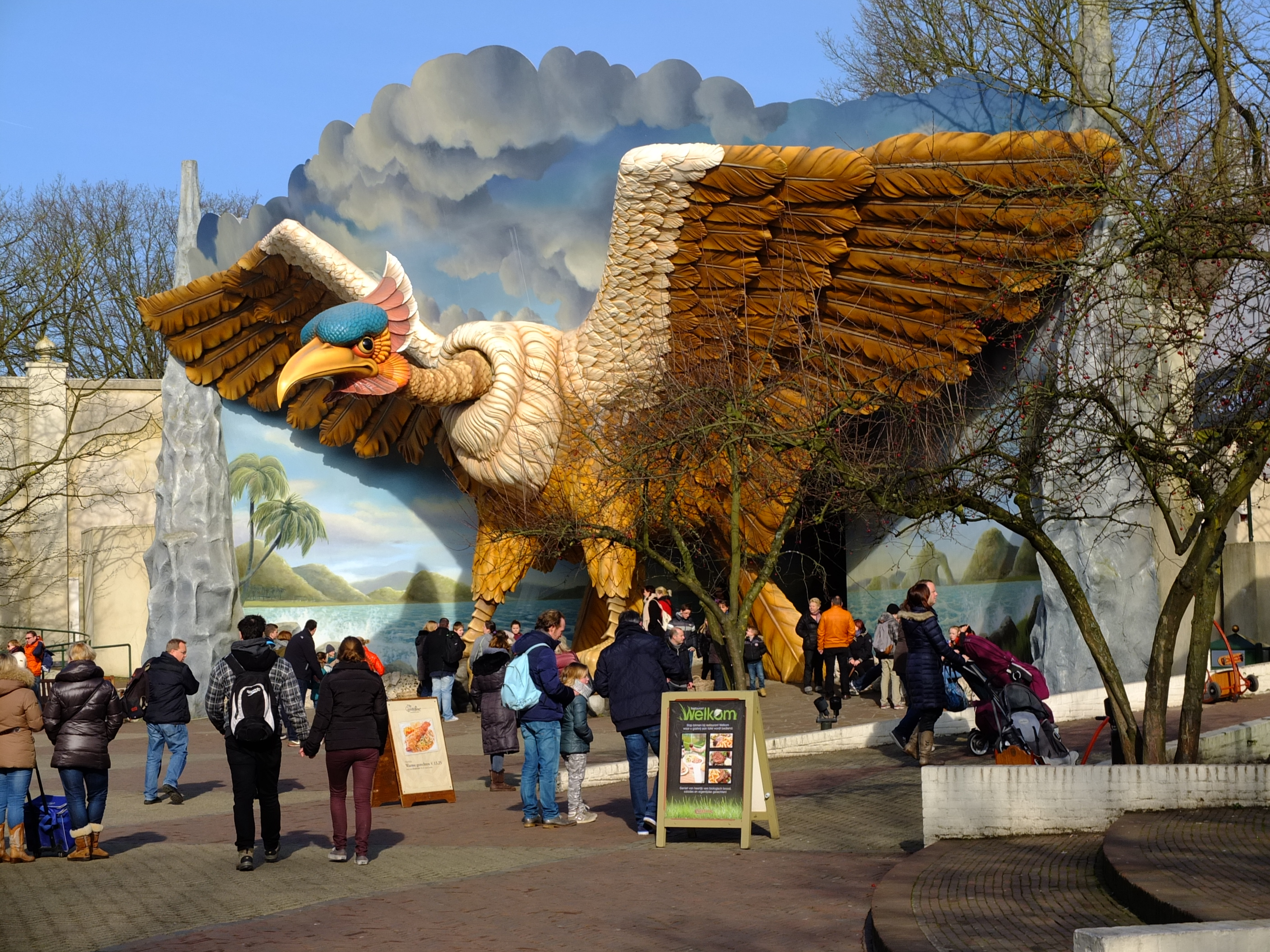 Vogel Rok